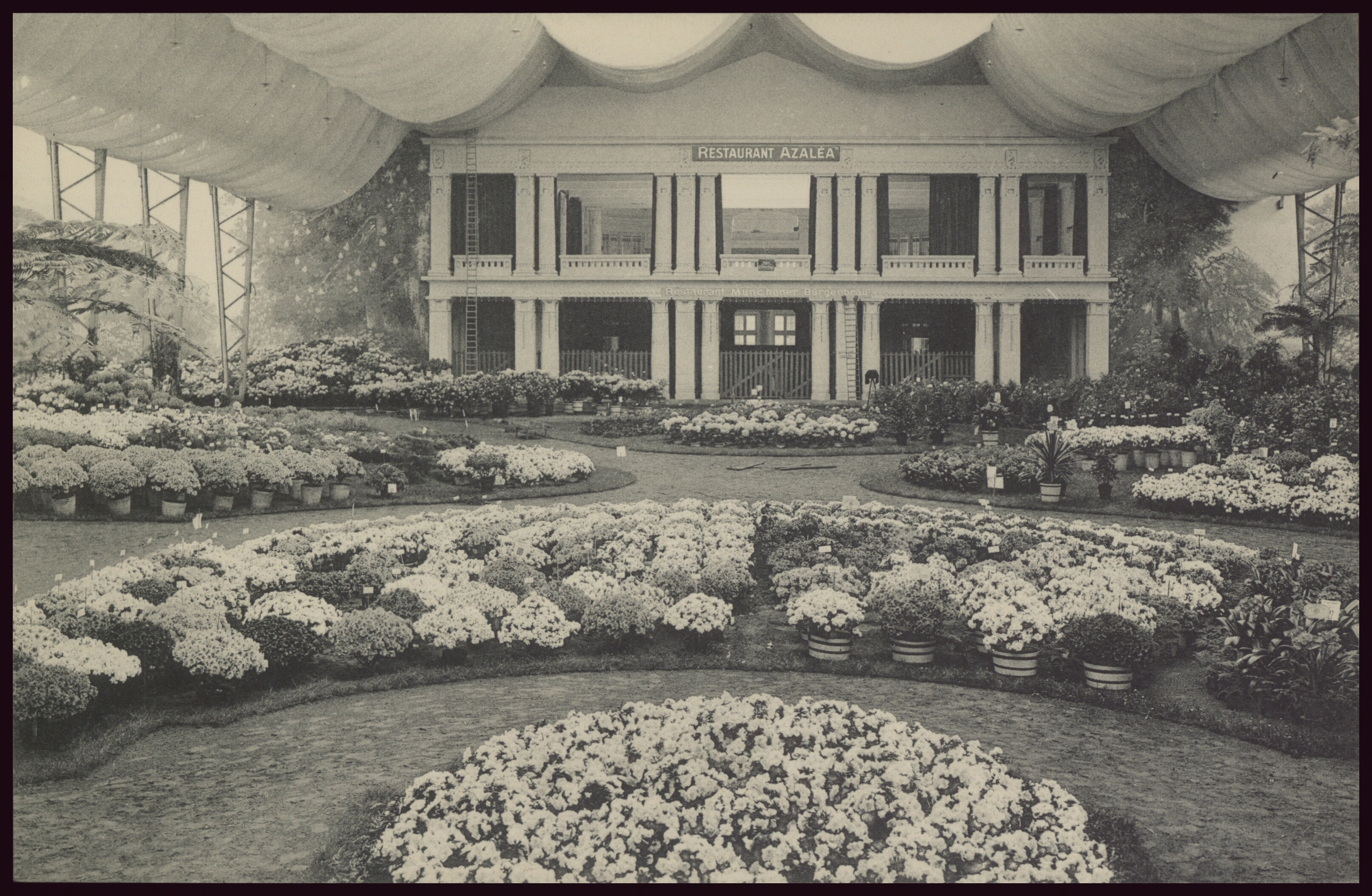 Foto van het interieur van het Floraliënpaleis tijdens de wereldtentoonstelling van 1913